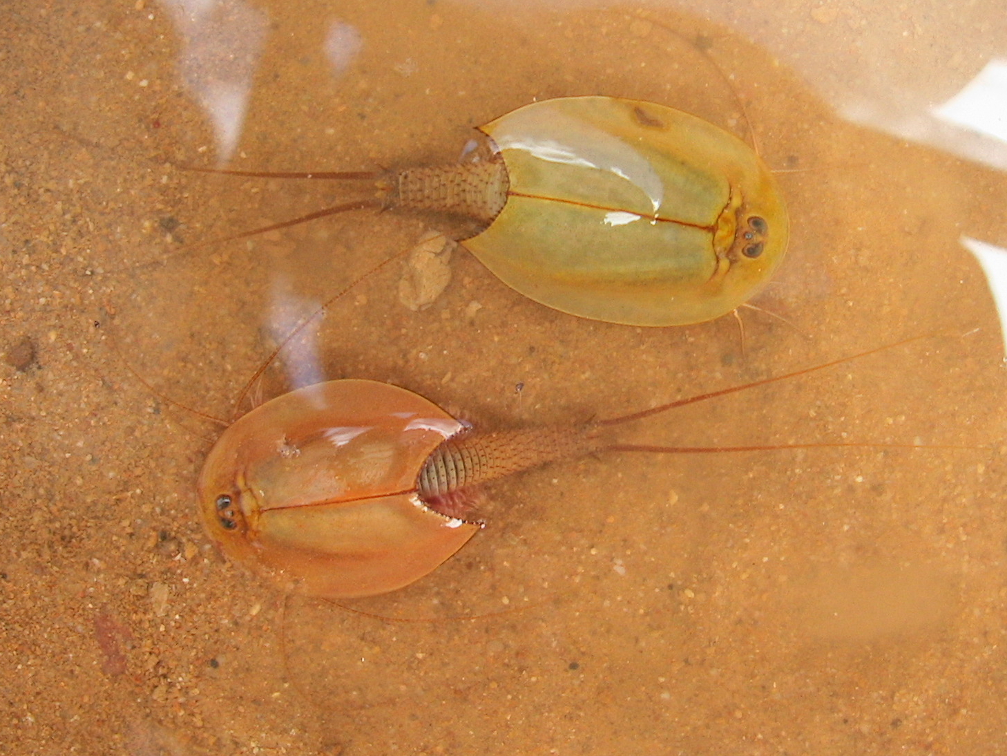 Cuerpo dividido en tres regiones: un amplio capa-razón dorsal (ovalado y escotado en su borde posterior), una serie de segmentos troncales y dos cercópodos filamentosos. En la parte anterior destaca la presencia de tres ojos (de ahí su nombre): dos laterales compuestos y uno central simple. Ventralmente es reseñable la presencia de numerosos apén- dices: antenas, anténulas, toracópodos y apéndices troncales.